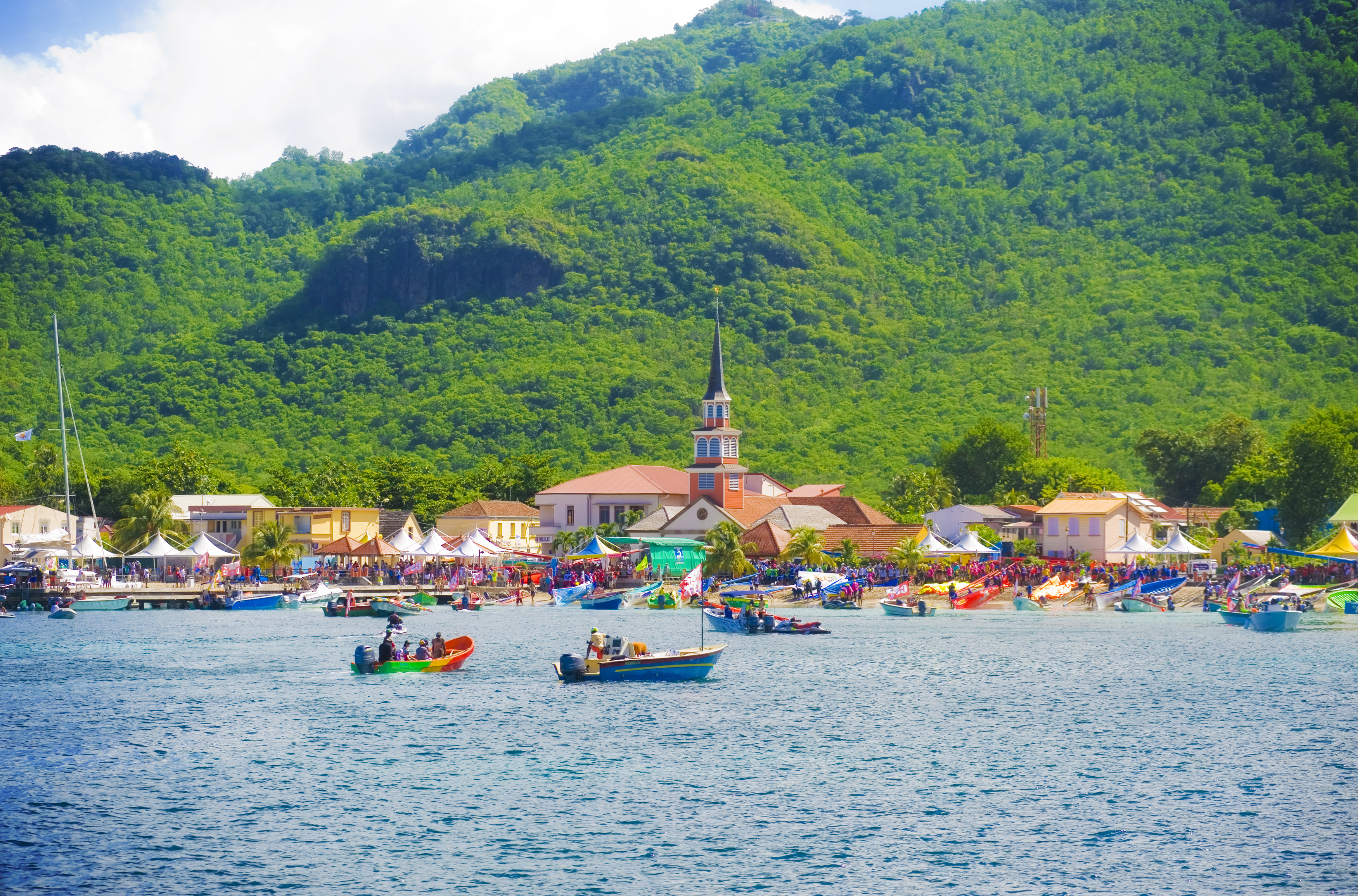 Le tour des Yoles se fait chaque année en Martinique. C'est une embarcation typique qui peut accueillir jusqu'à 14 yoleurs. La compétition se fait sur une semaine et permet de faire le tour de la Martinique en plusieurs étapes. C'est très suivi par le public ( a terre ou sur l'eau ). Photographié en Martinique